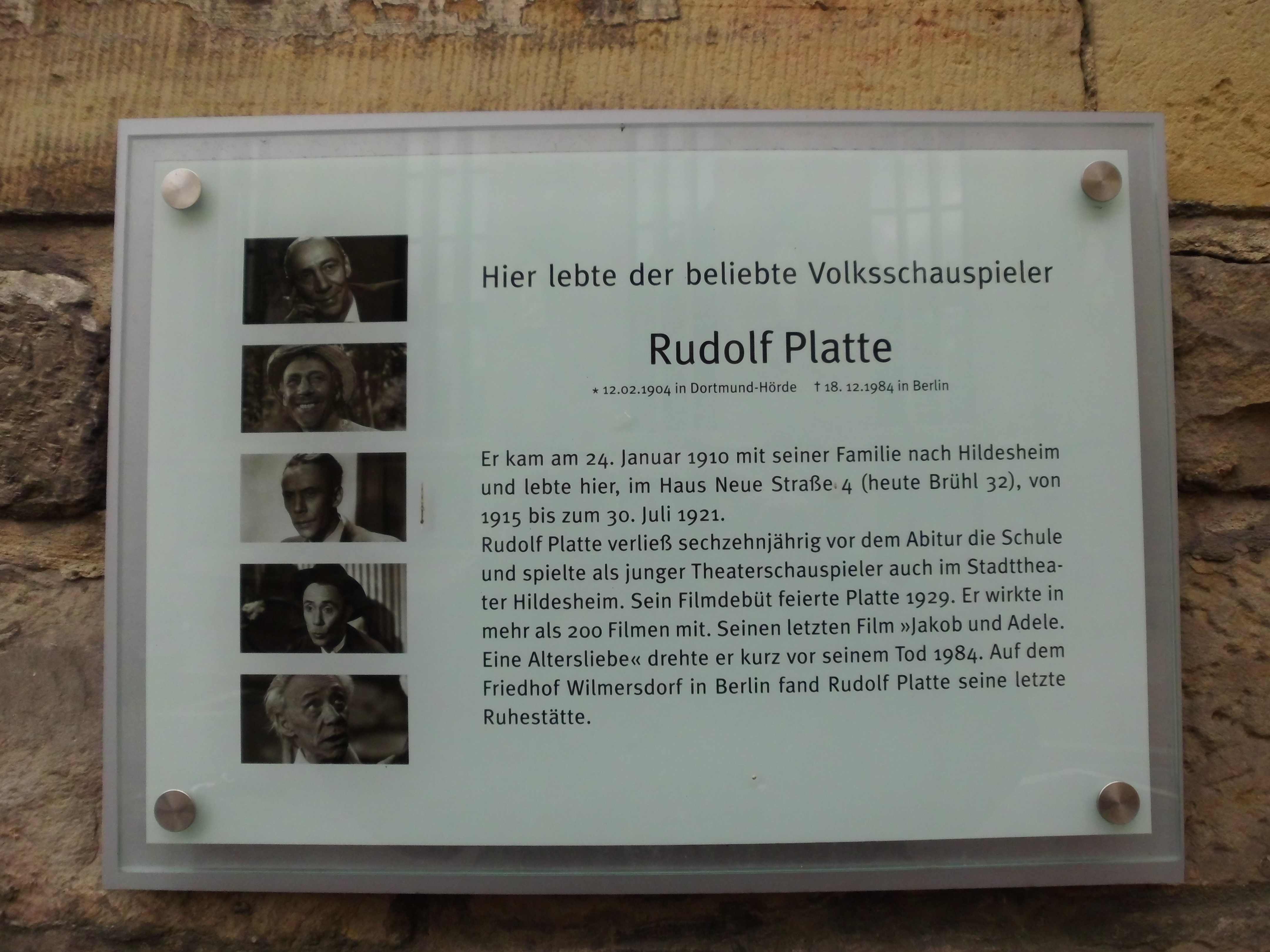 Infotafel am Haus, in dem Rudolf Platte in Hildesheim gelebt hat.